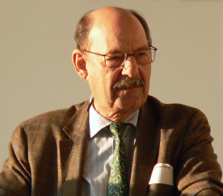 Michael Fürst in Hameln beim 1. Fachforum zur Erinnerungskultur zum Bückeberg